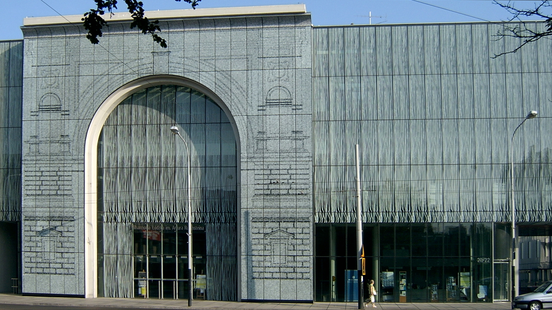 Łódź, Filharmonia Łódzka im. Artura Rubinsteina, ulica Narutowicza 20-22.